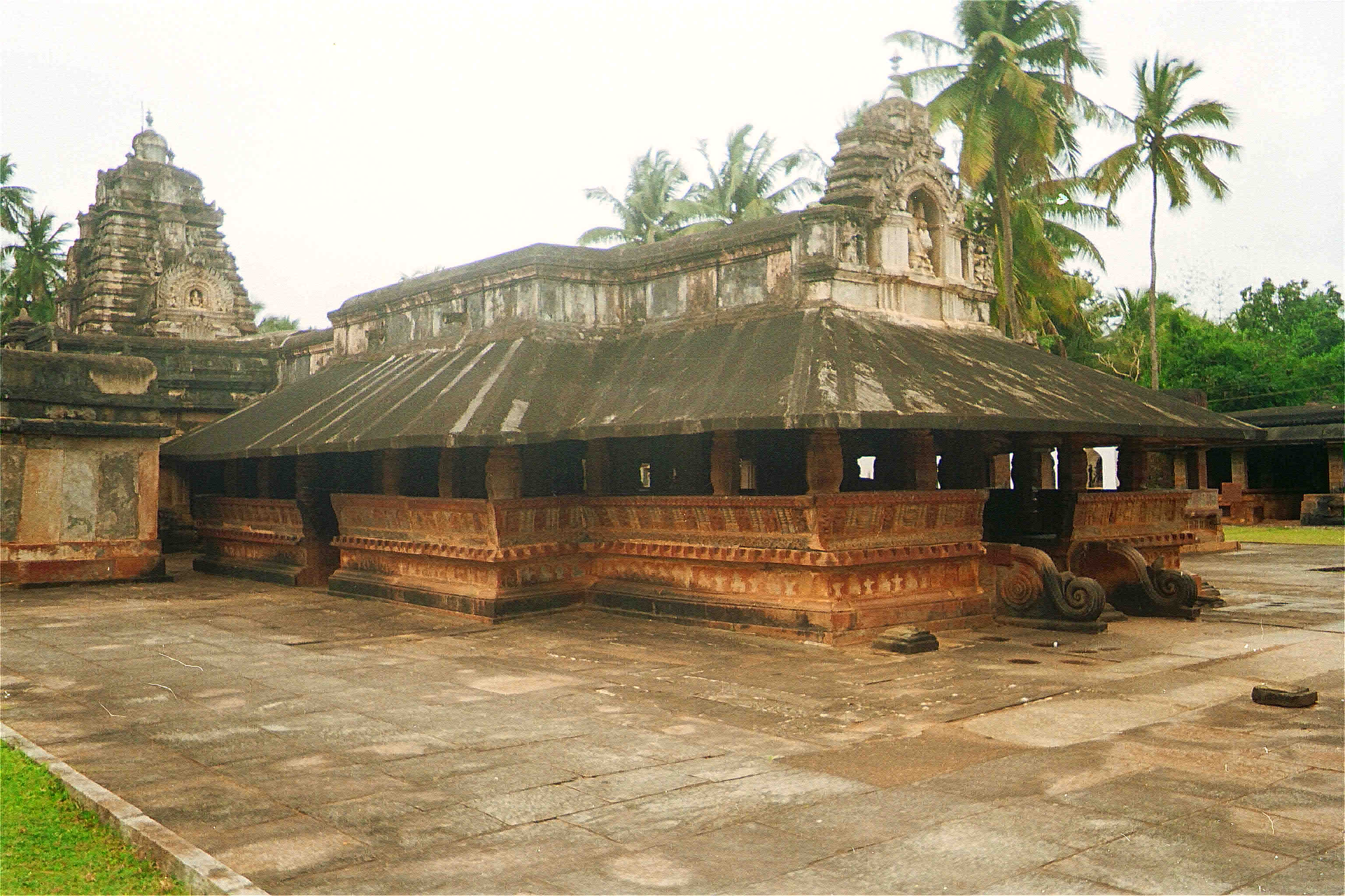 Madhukeshwara Temple, Banavasi, Karnataka State, India; Author User:Clt13